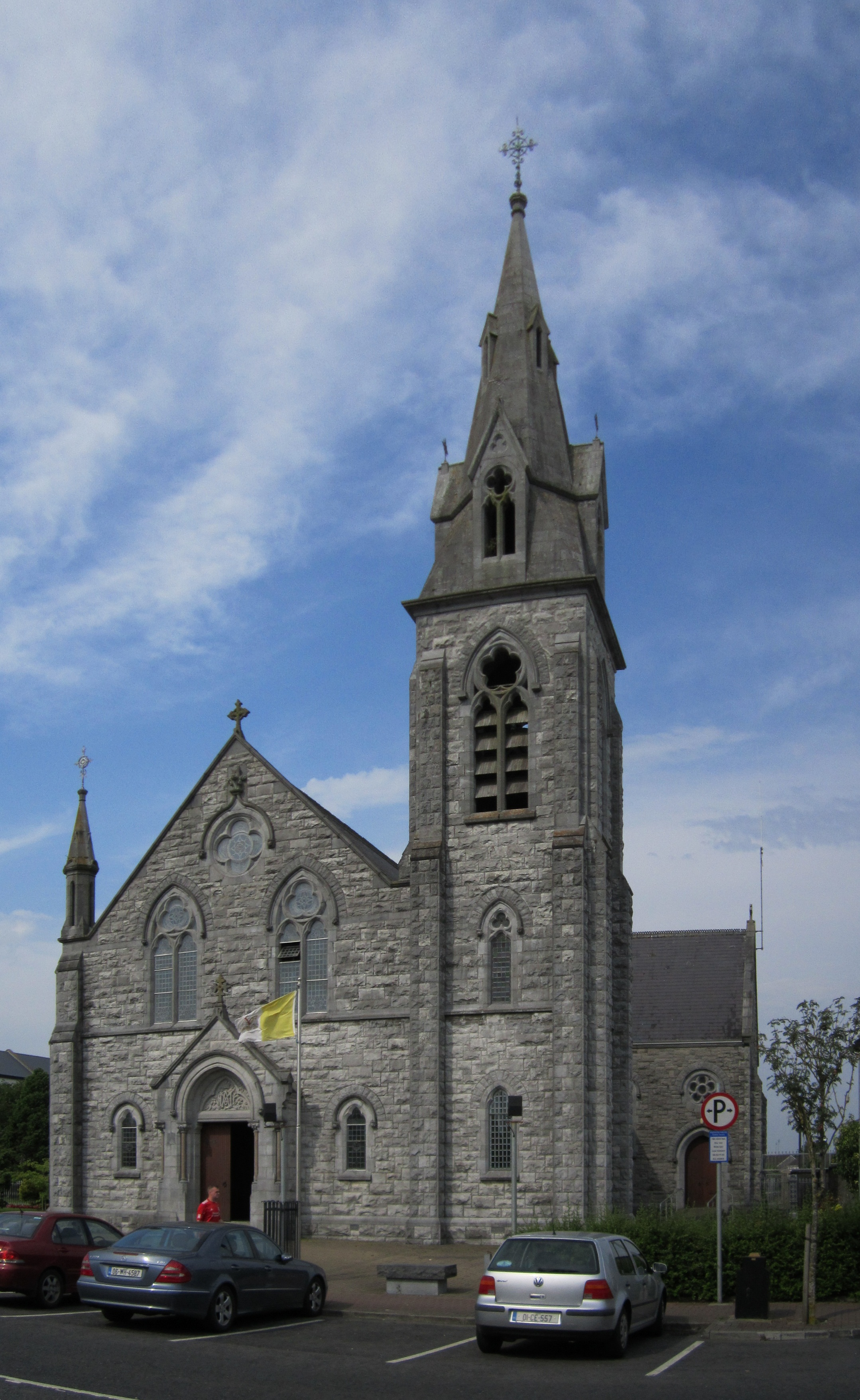 Eglise St.Mary à Kinnegad (Cionn Átha Gad en irlandais), comté de Westmeath en République d'Irlande.